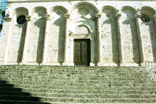 Massa Marittima, Toscana, Italia